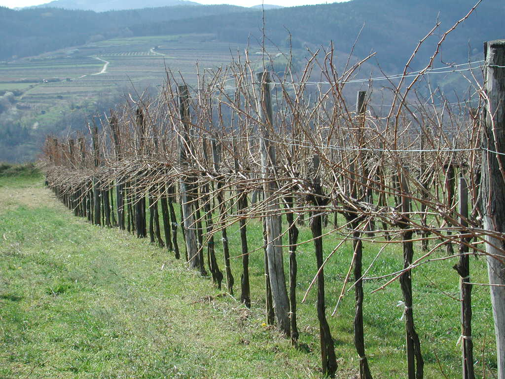 Hochkultur Lenz Moser